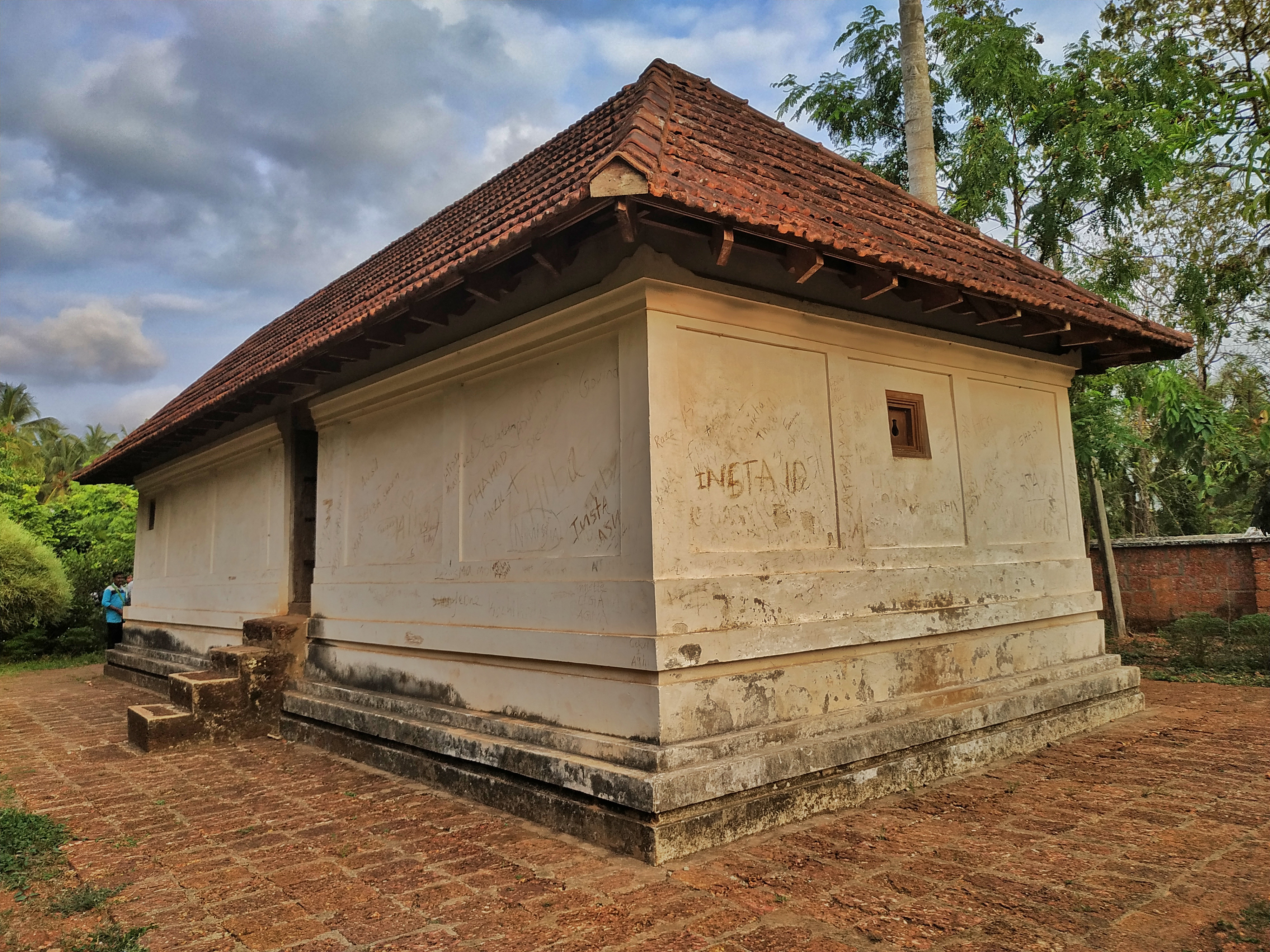 Changampalli Kalari Back side view. Part of Mamankam Monuments